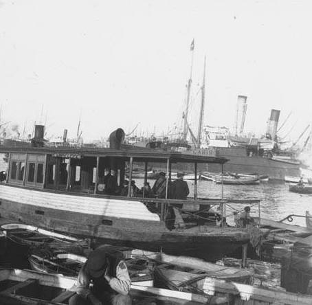 Embarcacions al port de Barcelona i una ' golondrina ' amb passatgers. Frederic Bordas i Altarriba (1888)